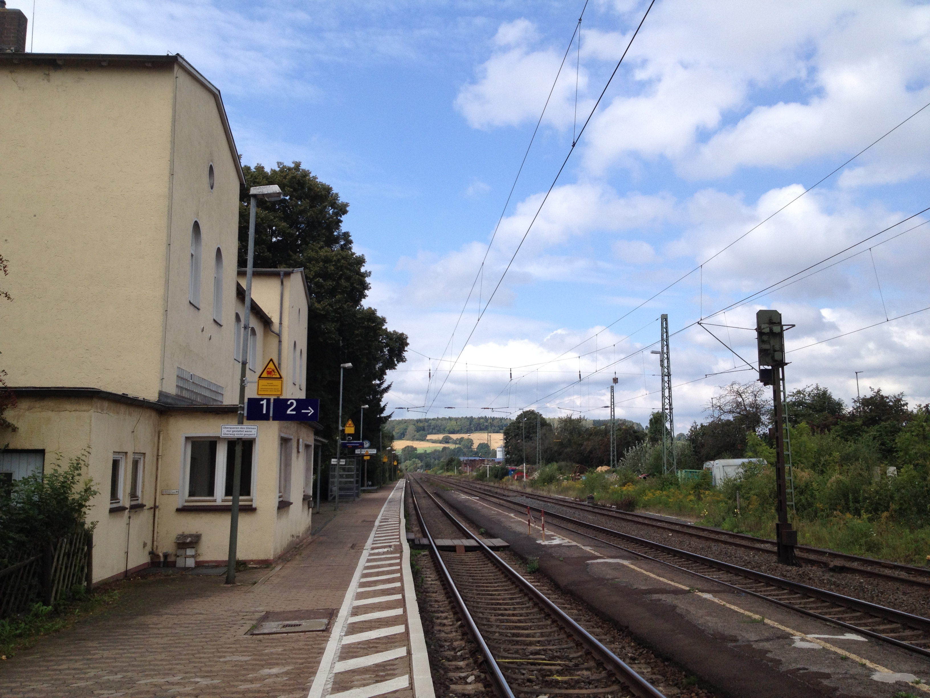 Die Gleise 1 (links) und 2 (rechts), sowie das Bahnhofsgebäude, in welchem ein Fahrdienstleiter stationiert ist, des Bahnhofes Hannoversch Münden-Hedemünden im Werratal